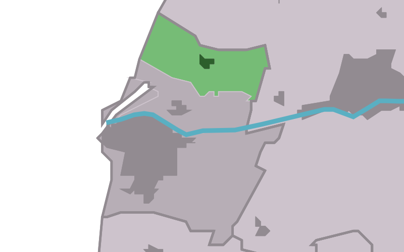 Kaartsje fan himrik fan Winaam